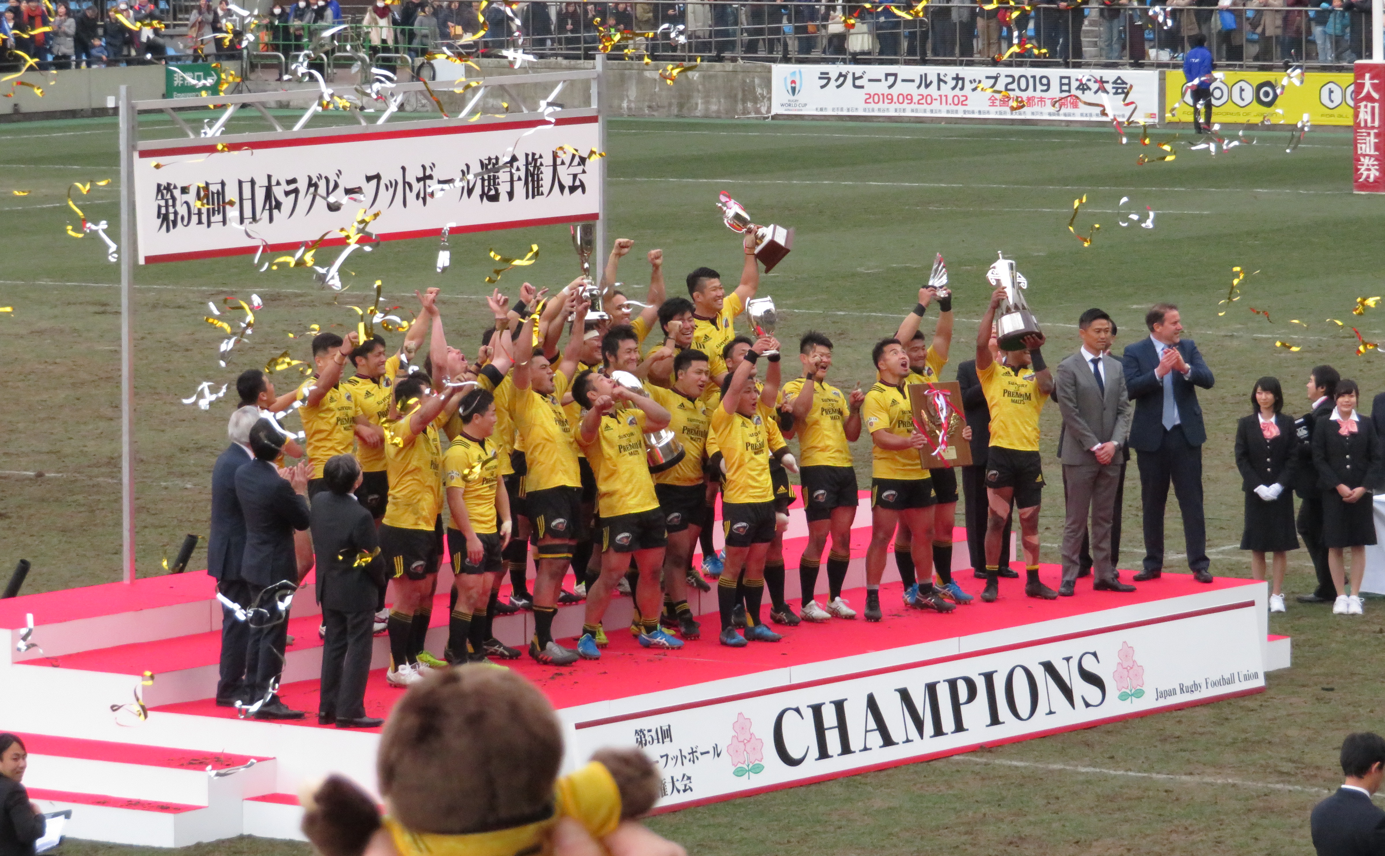 第54回日本ラグビーフットボール選手権大会の優勝を喜ぶ、サントリーサンゴリアスの選手たち